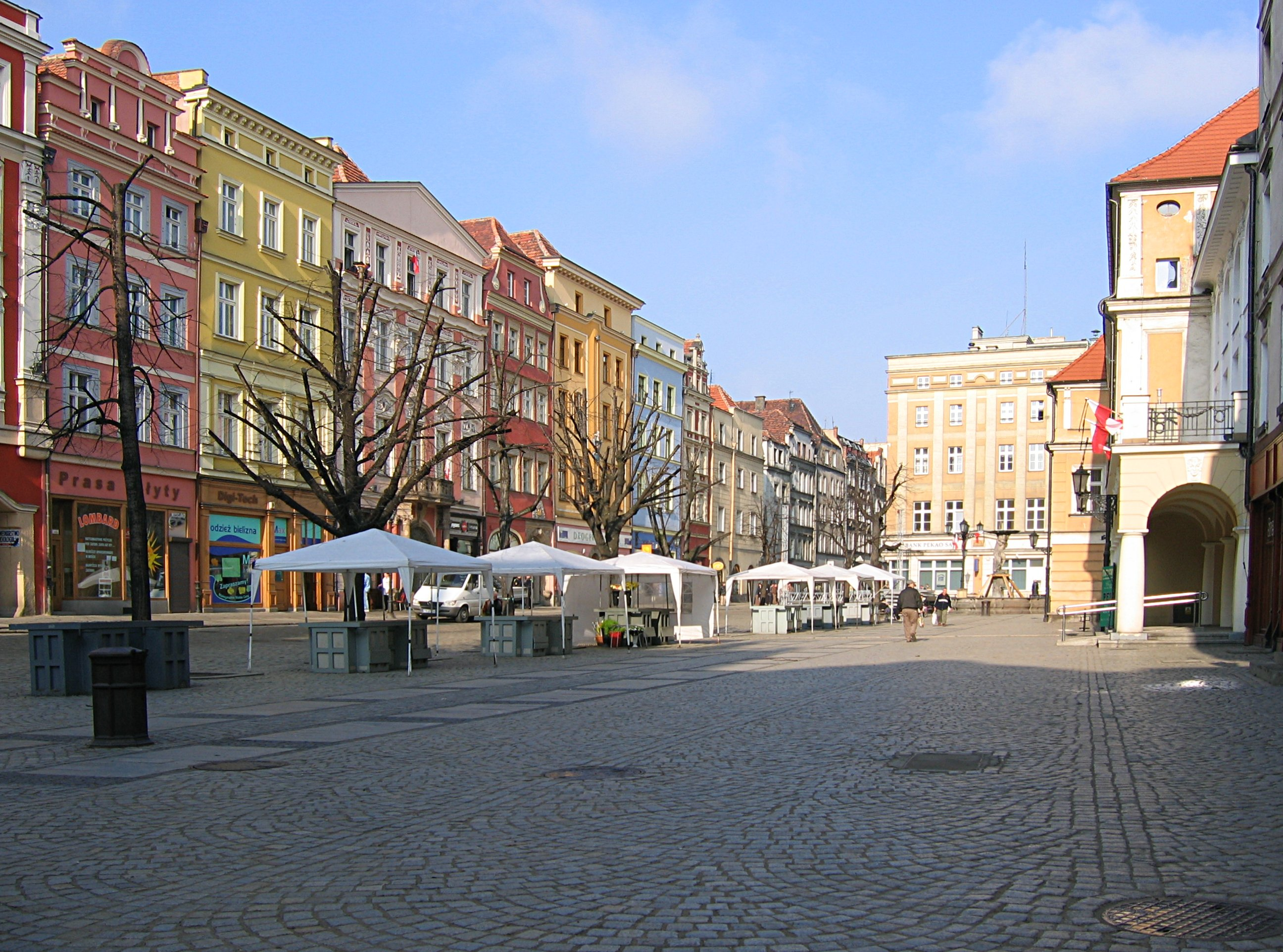 Kamienice w Świdnicy